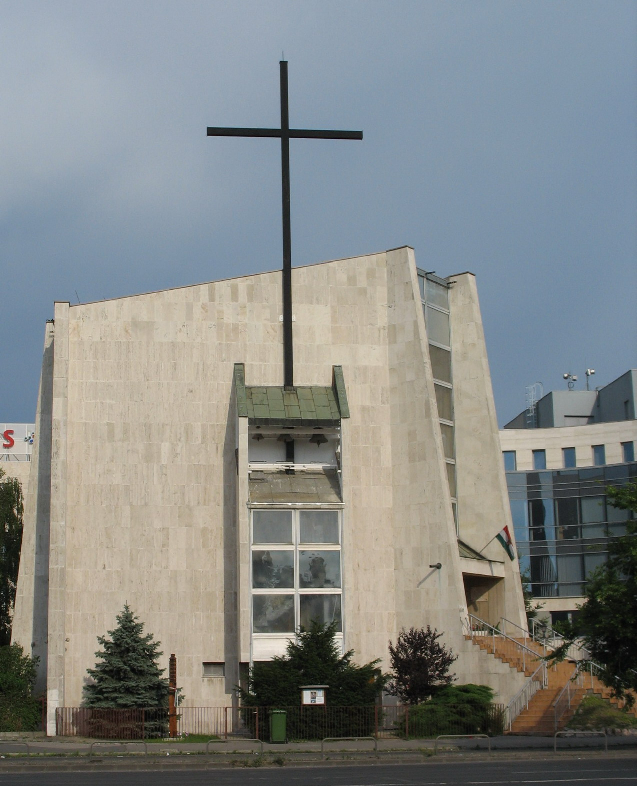 Katolikus templom (Szt.Márton templom).Budapest. Váci utca.